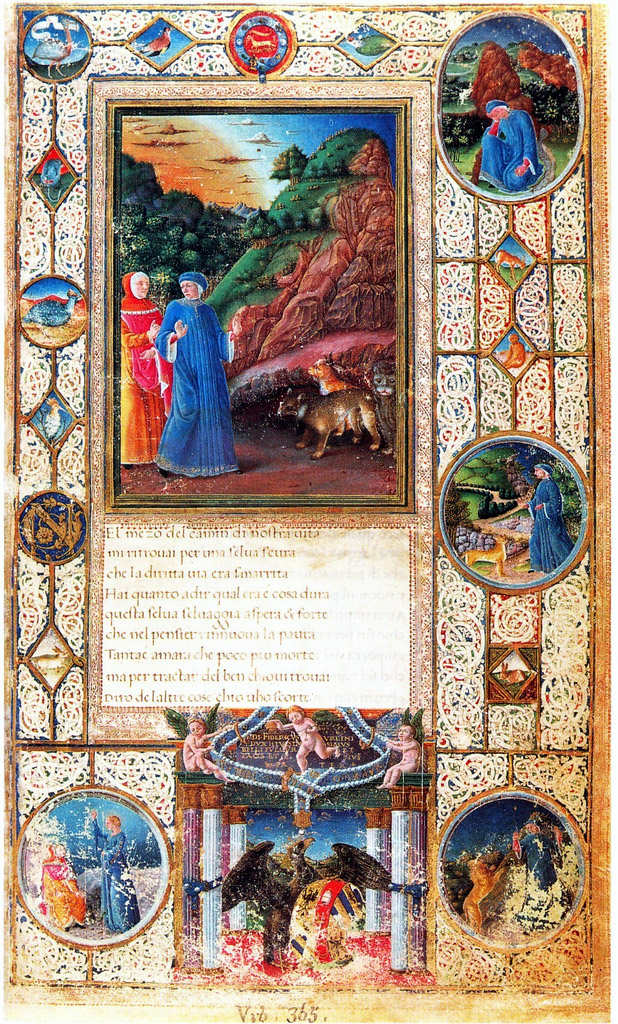 Miniature tirée d'un manuscrit de la Divine comédie de Dante (Chant I) ayant appartenu à Federigo da Montefeltro